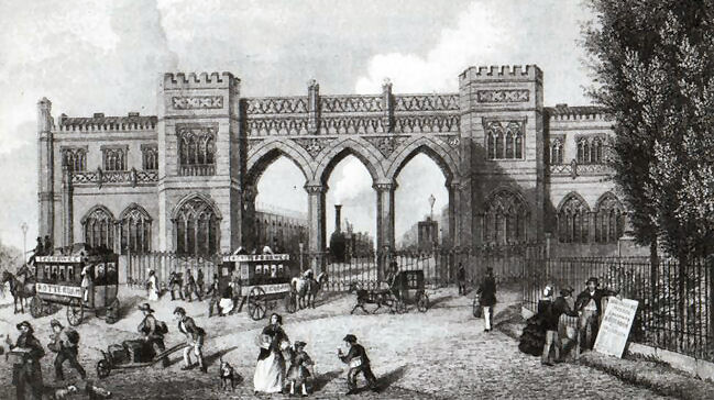 Staalgravure van Joseph Maximilian Kolb